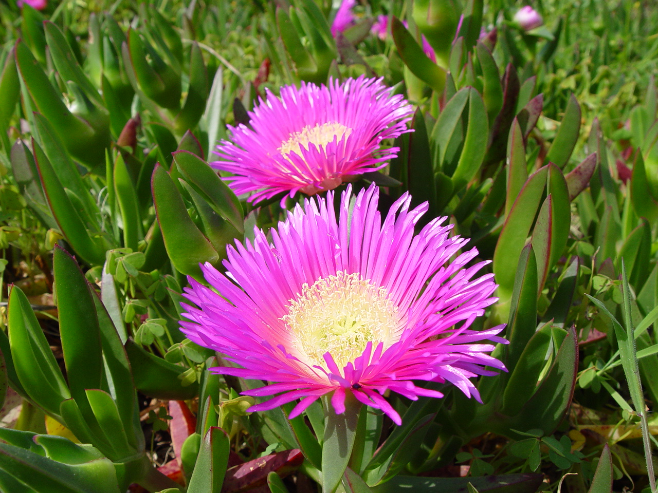 Name Carpobrotus edulis Familiy Aizoaceae